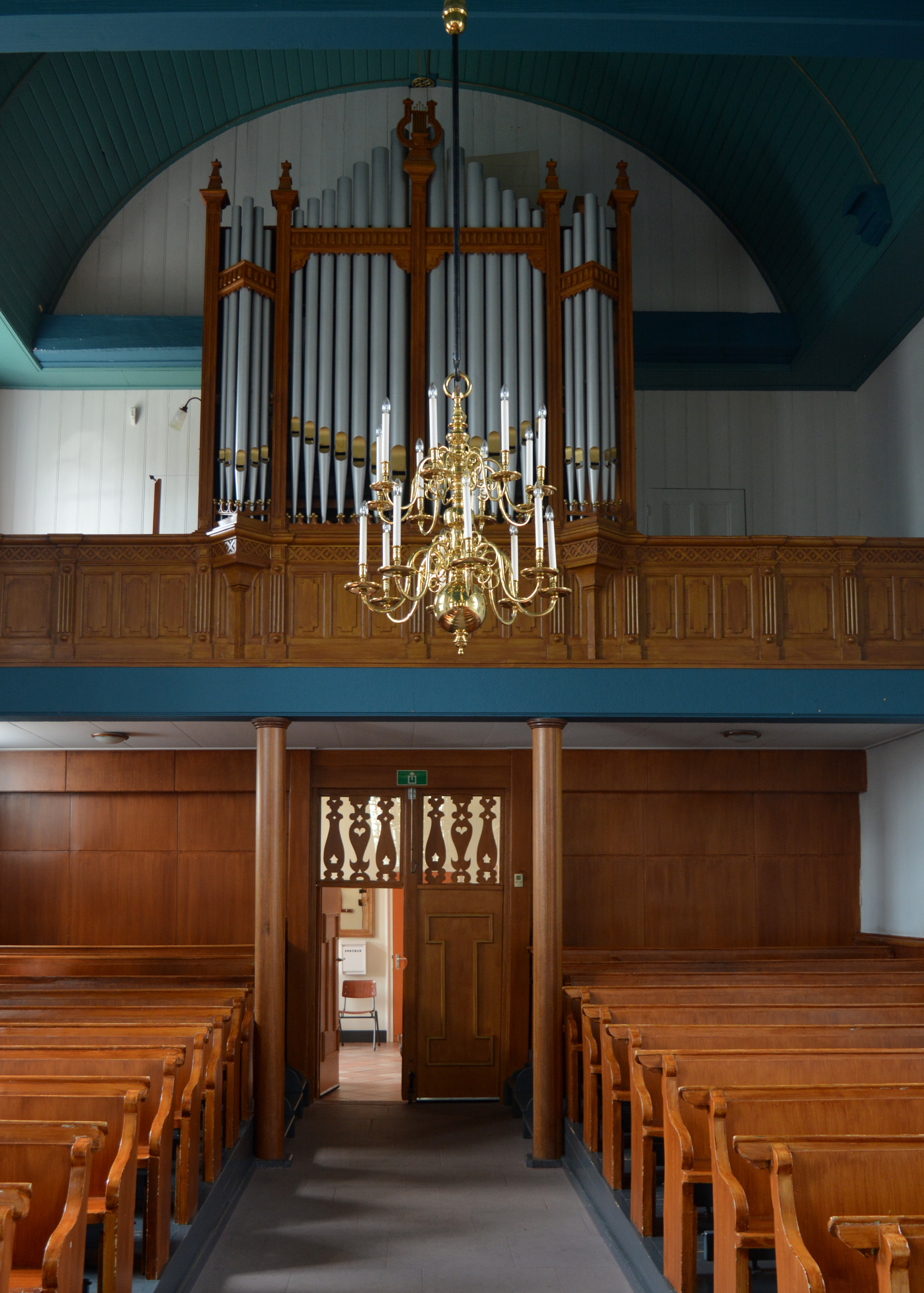 Surhuizum, prot. dorpskerk, orgel